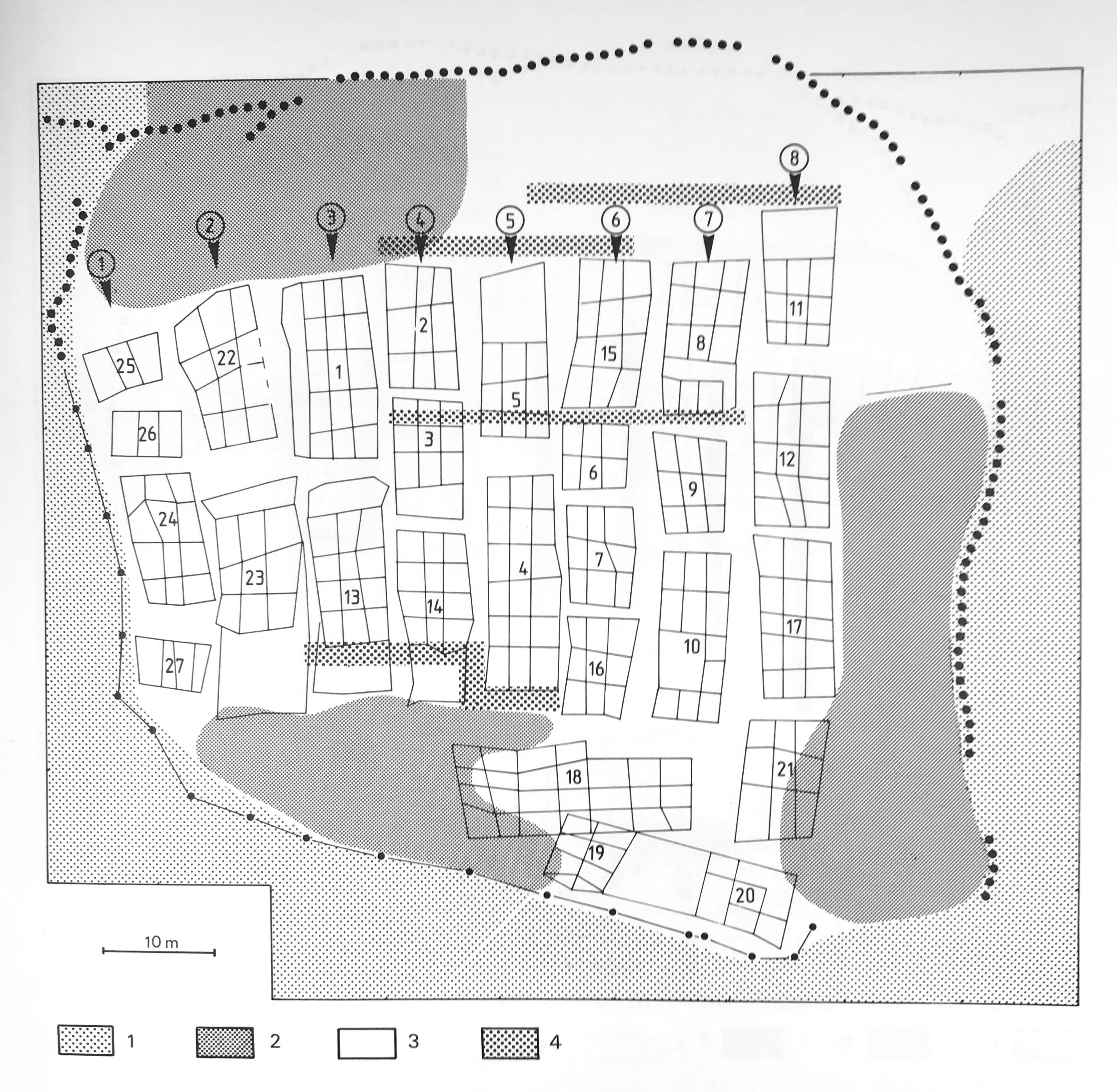 Modèle d'aménagement et organisation spatiale du village de Cortaillod-Est. Tiré de RIBAUX P. 1986 : Cortaillod-Est, un village du Bronze final 3, L’homme et la pierre. Ed. du Ruau, Saint-Blaise. p. 27